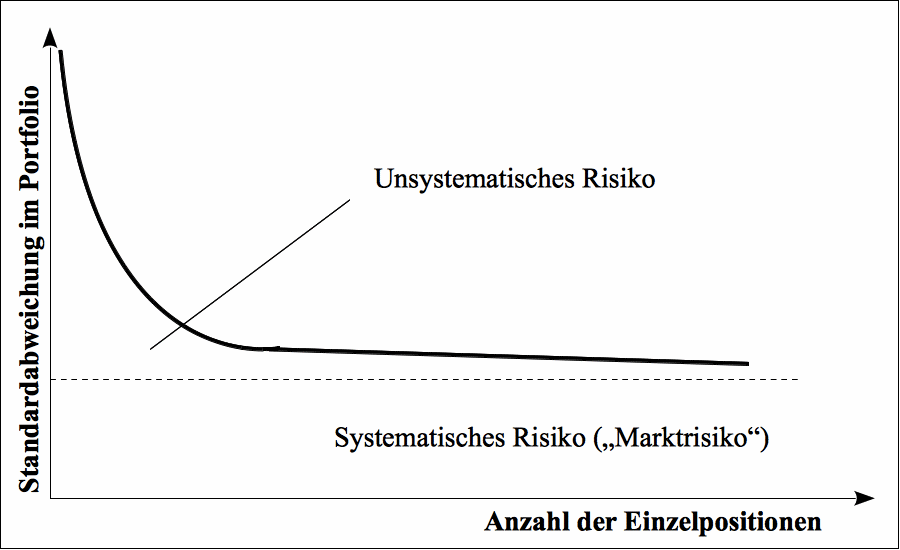 Systematisches und unsystematisches Risiko im Portfolio